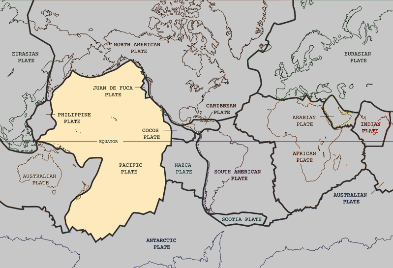 Bildbeschreibung: Tektonische Platten; Pazifische Platte hervorgehoben Fotograf/Zeichner: Ingo Wölbern Datum: 26.02.2006 Sonstiges: Bearbeitung der Vorlage 800px-Tectonic_plates.png aus Commons, zur besseren Veranschaulichung der Pazifischen Platte.